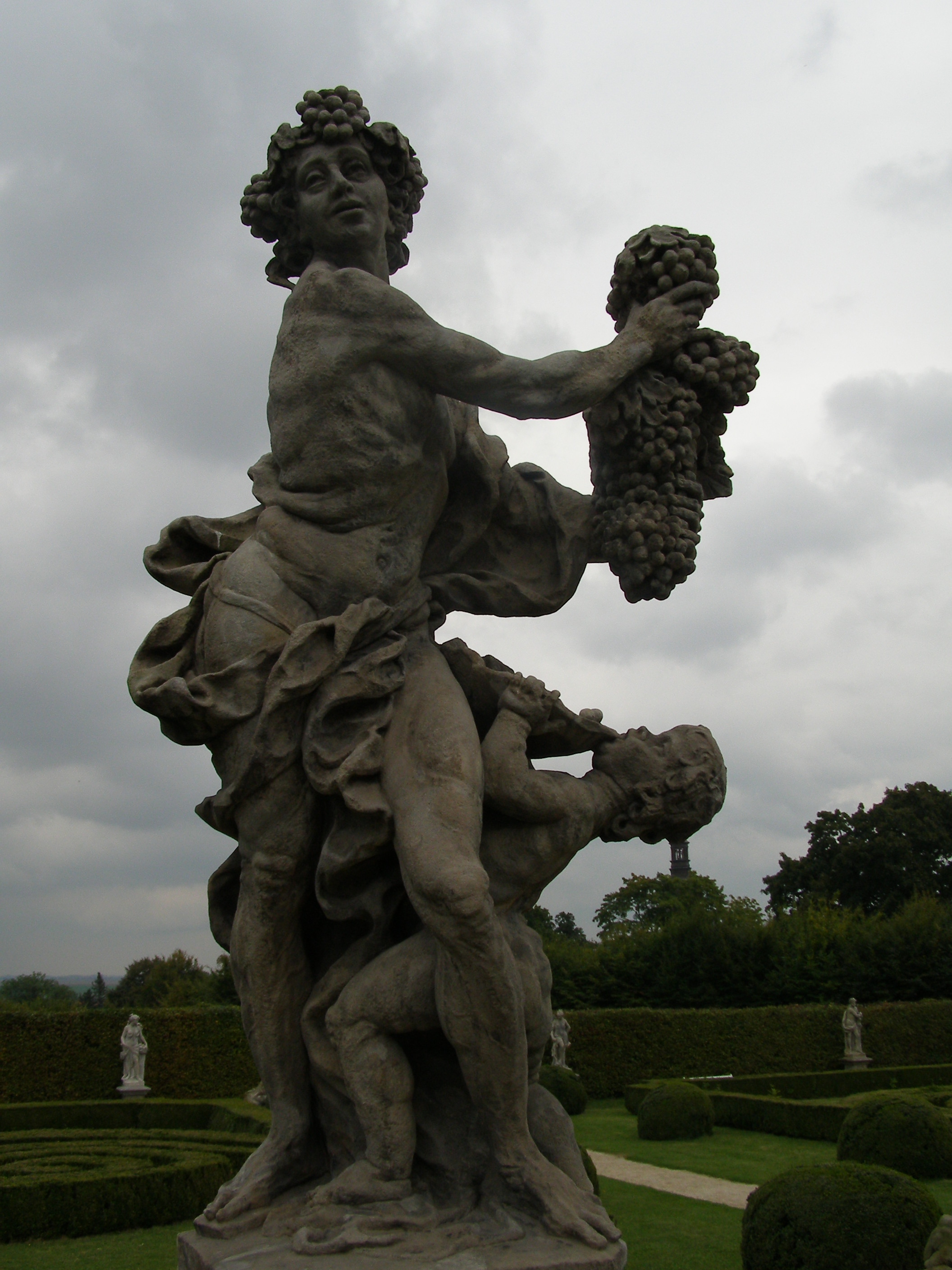 Zámek Lysá nad Labem, Zámecká 1/21, Lysá nad Labem